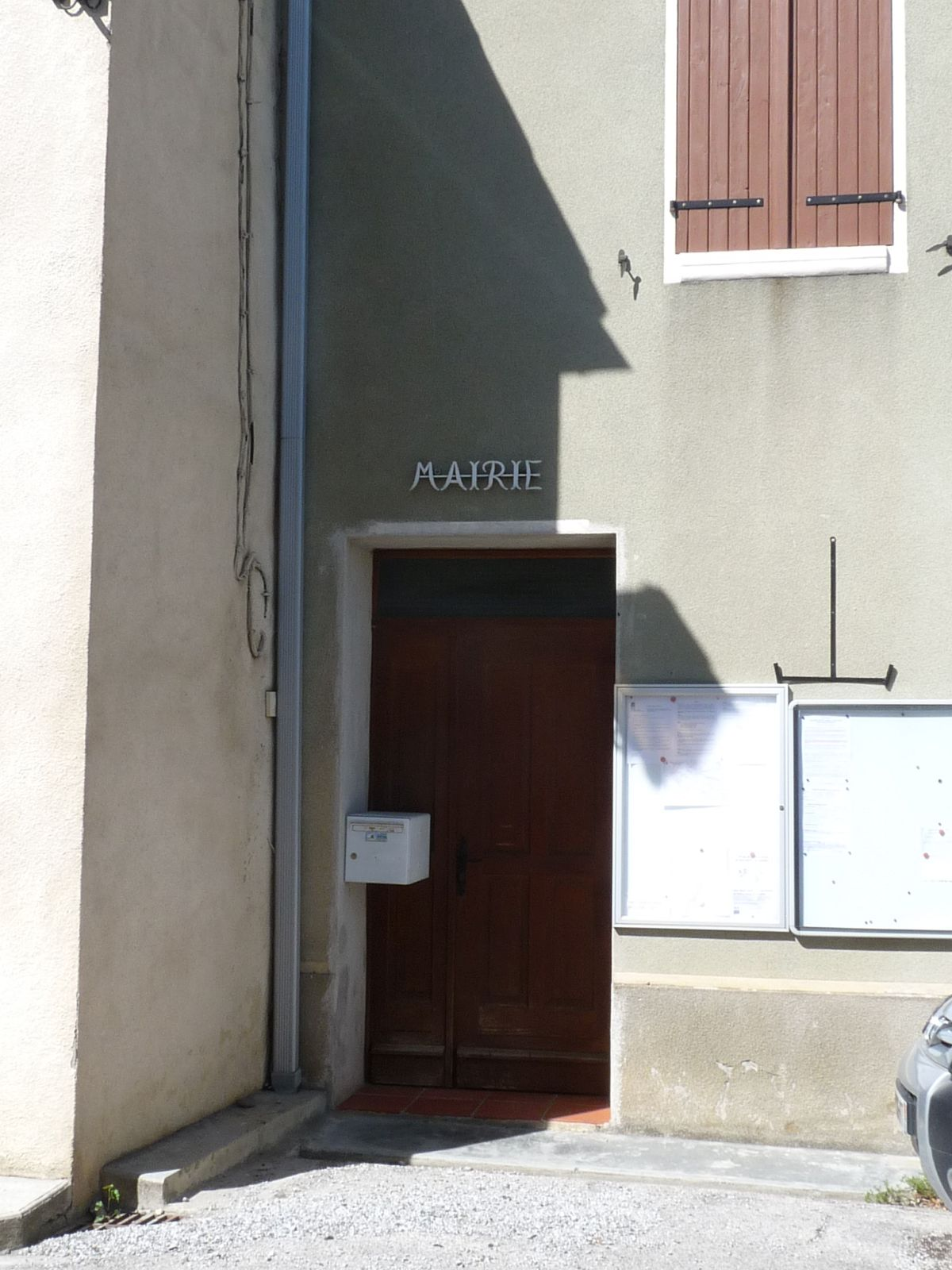 Mairie de Juzes, Haute-Garonne, France